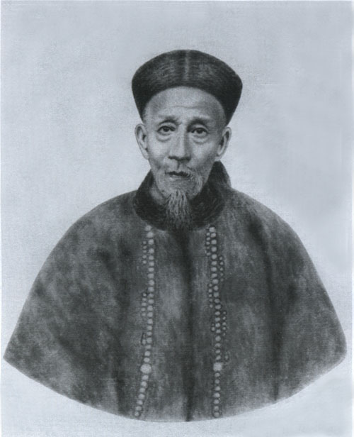 畫文勤公像王闓運贊